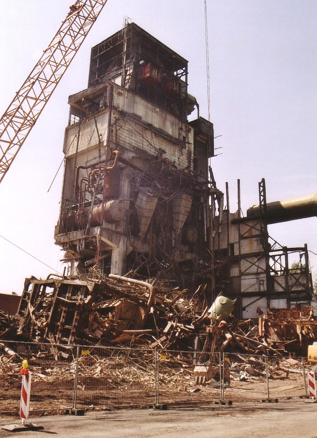 Abriß des alten Cuno-Kraftwerks in Herdecke